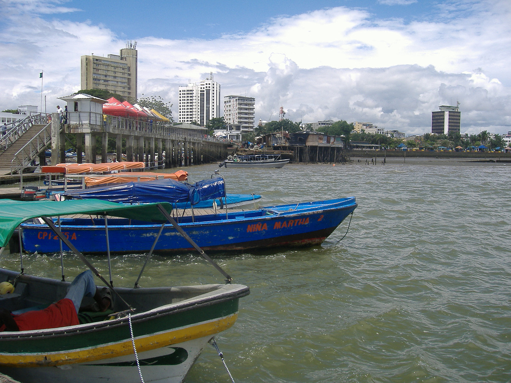 Muelle. Buenaventura, Valle del Cauca, Colombia